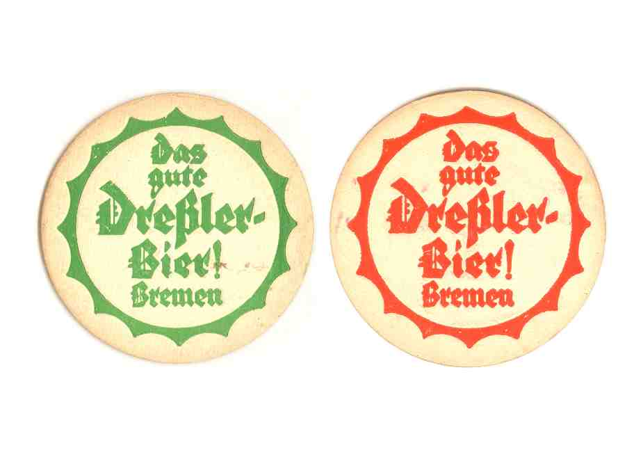 Bierdeckel der Dresslerbrauerei